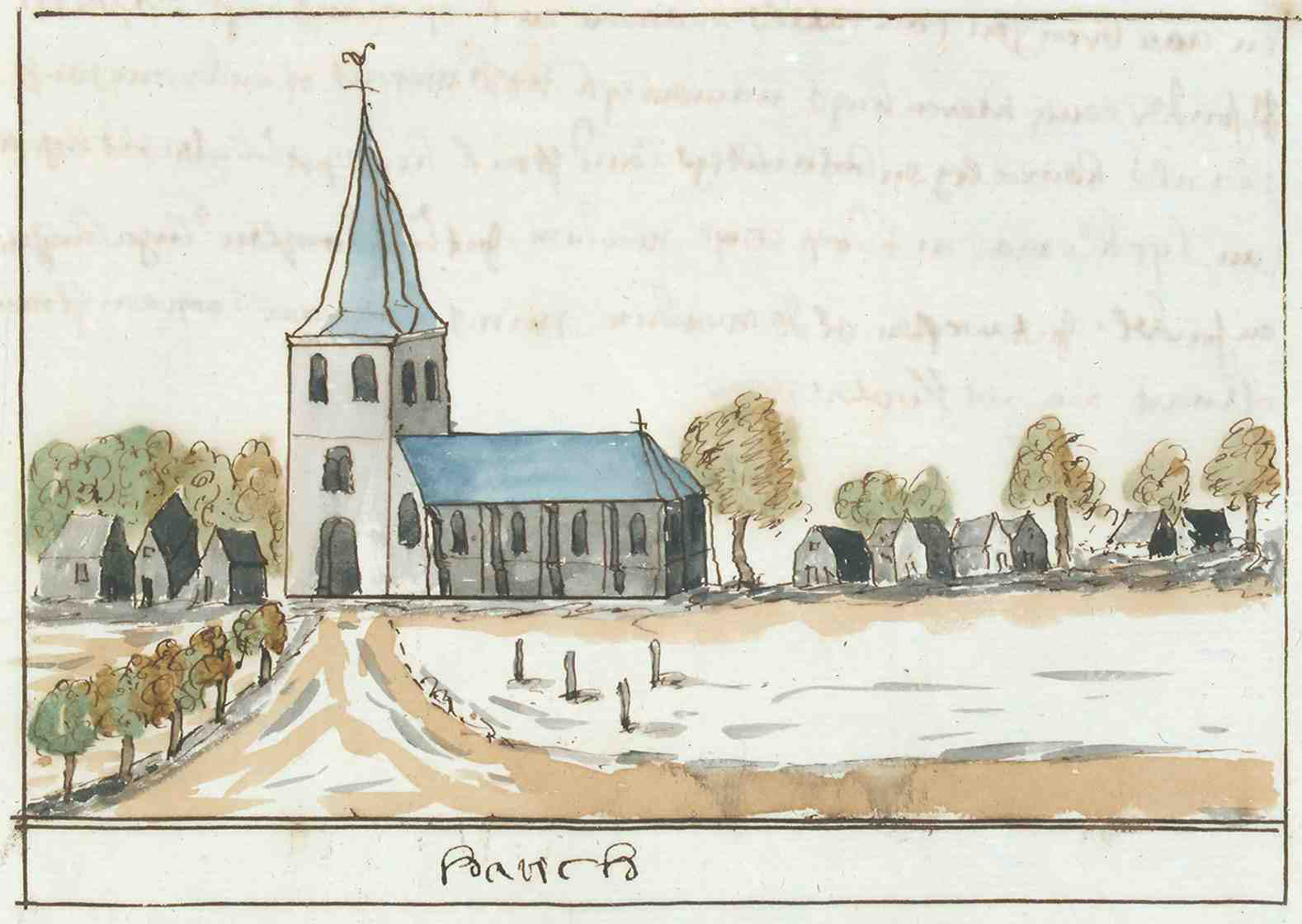 Korte Beschreijving van de Steden Dorpen Gehugten en Heeren-huizen der Heerlykheid Vriesland Benevens Desselfs Afbeeldingen Meest na 't leven getekent By een Vergaderdt Door Andries Schoemaker